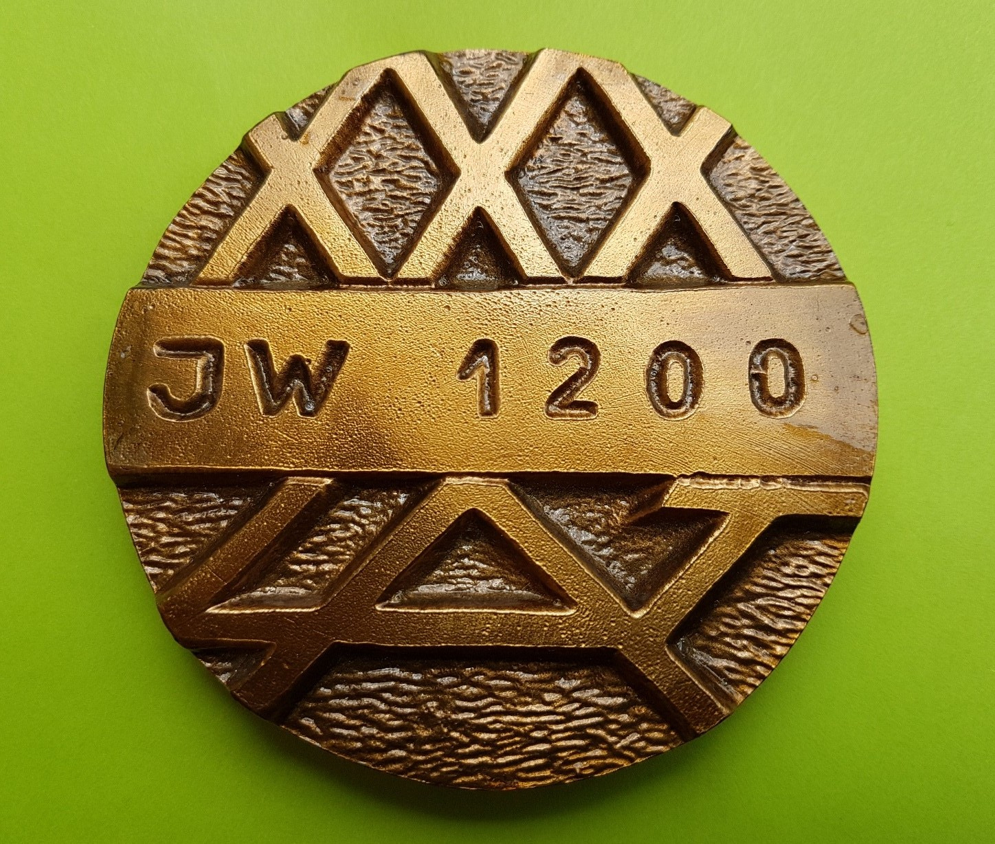 Rewers. Medal Pamiątkowy 8br